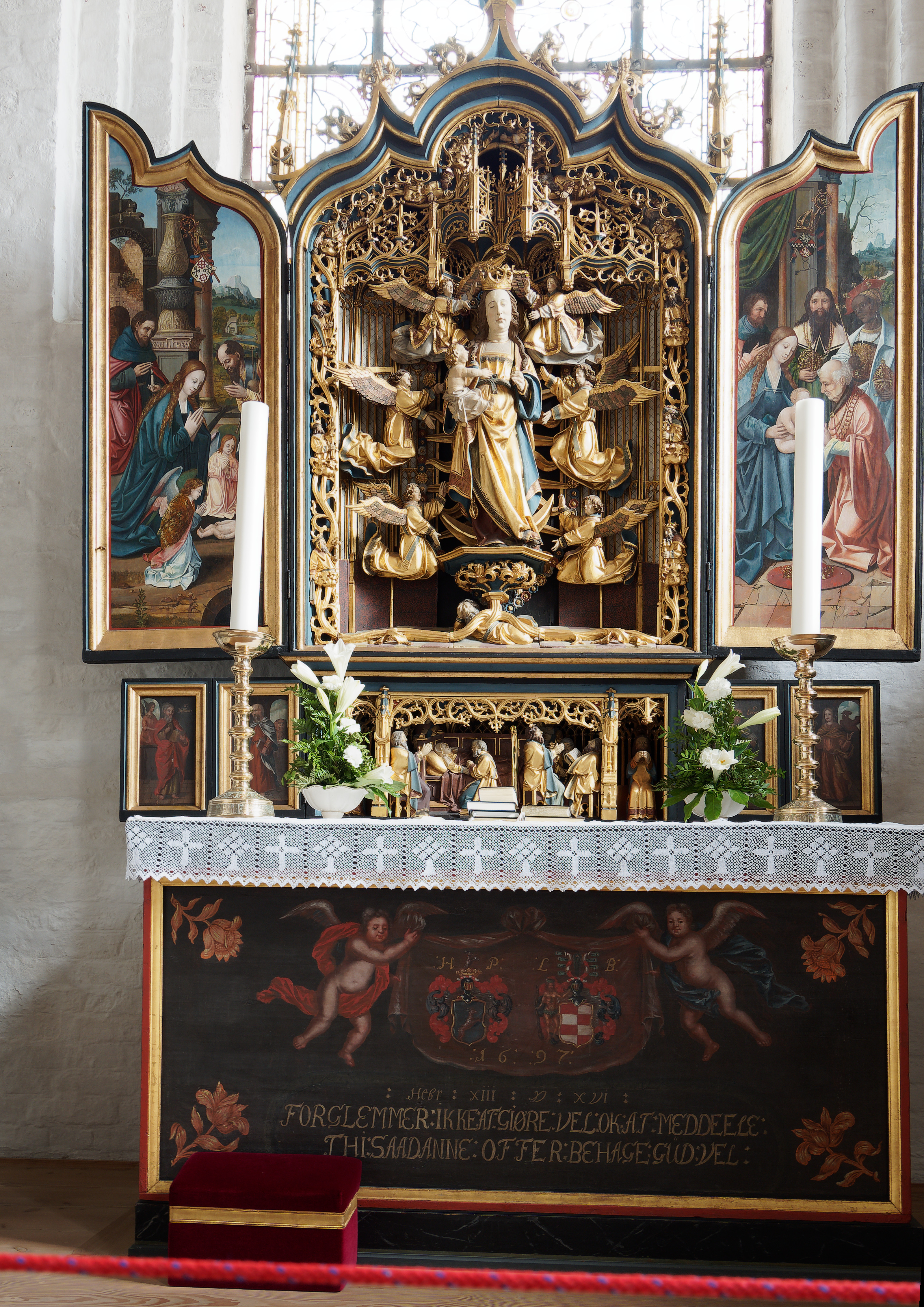 Die Marienkirche in Sæby (Frederikshavn Kommune), errichtet im 13 Jahrhundert, Altar mit dreiflügeligem Altaraufsatz. Dargestellt wird die Krönung Mariens zur Himmelskönigin.